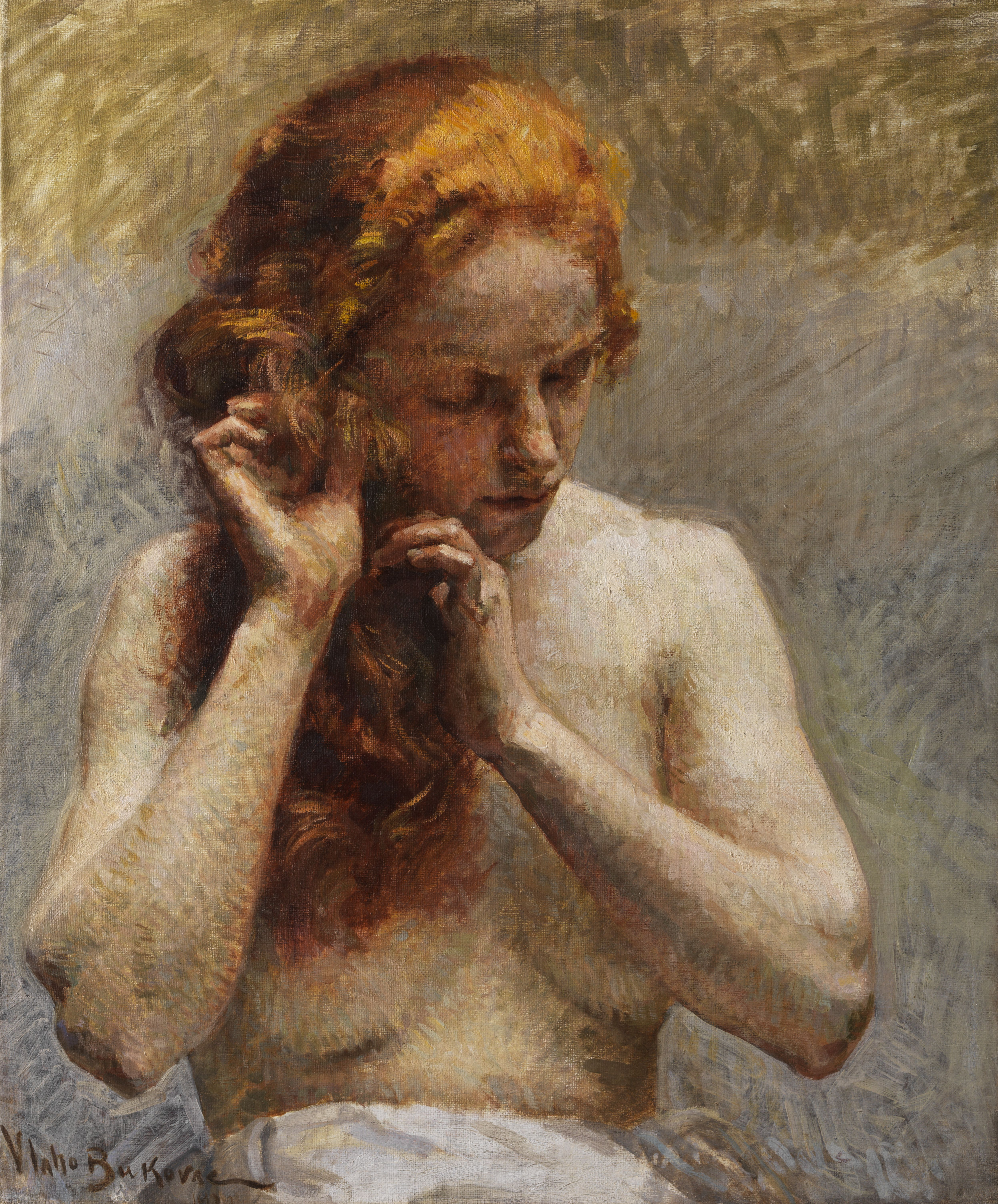 Weiblicher Halbakt. Öl auf Leinwand. 63 x 52 cm. Links unten signiert.